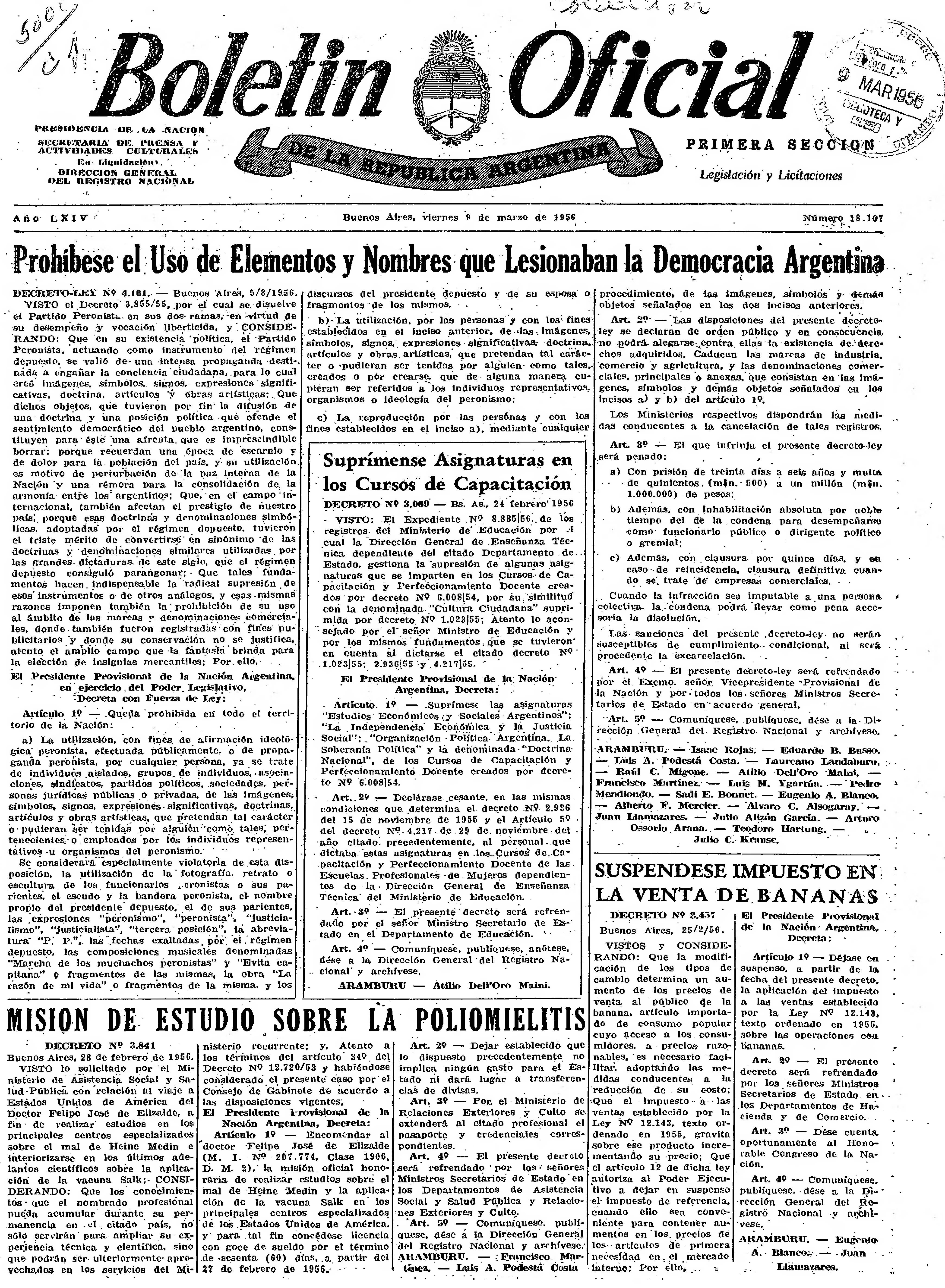 Boletín Oficial de la República Argentina. 1956 1ra sección, que incluye el Decreto ley 4161 de prohibición de propaganda peronista